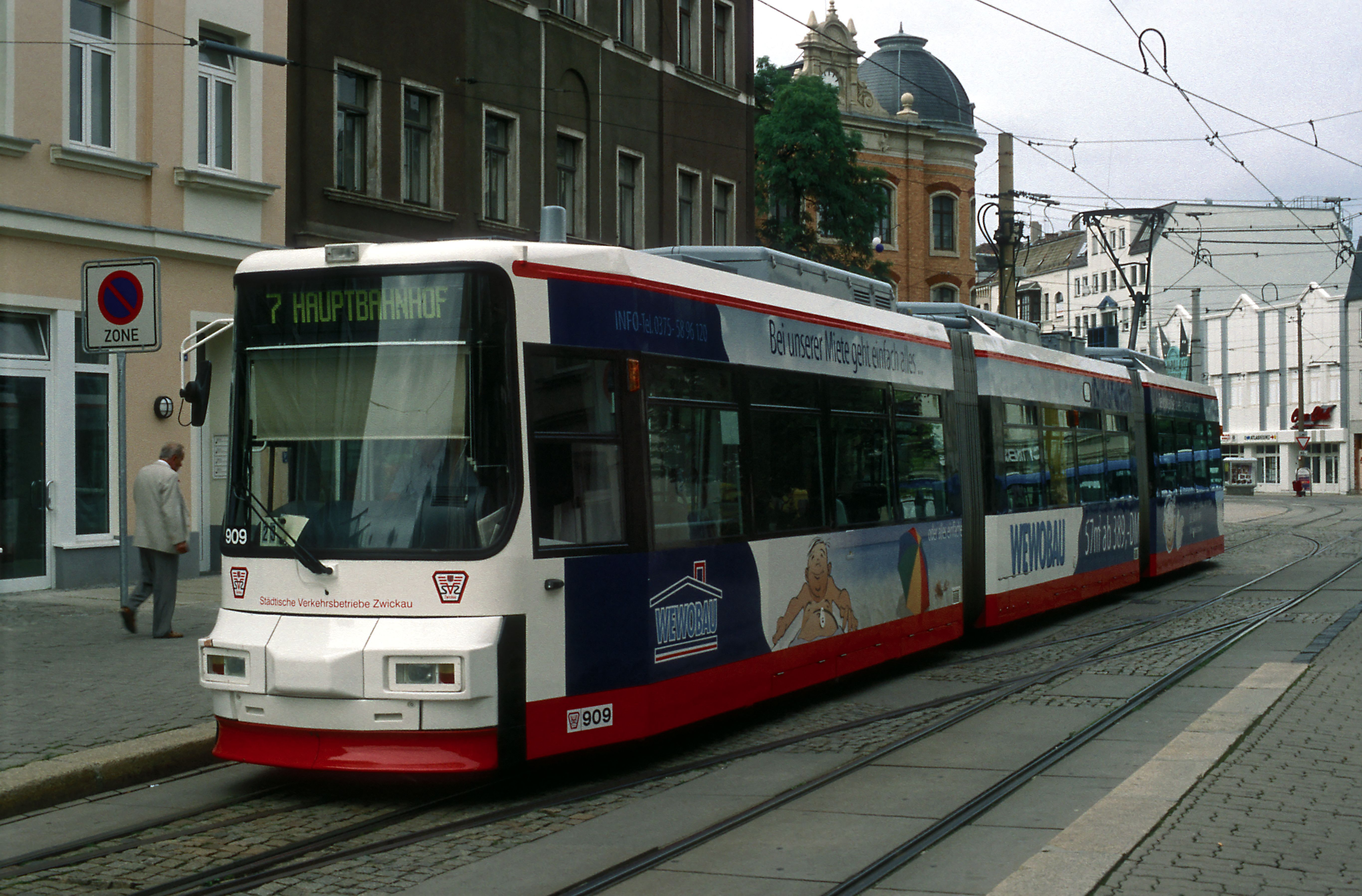 Richtung Hauptbahnhof.